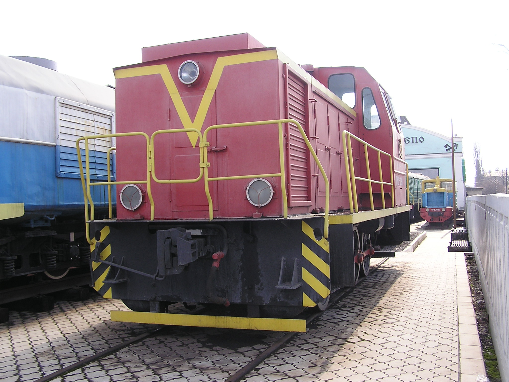 Музей истории и развития Донецкой Железной дороги. ТГМ23Б 3390